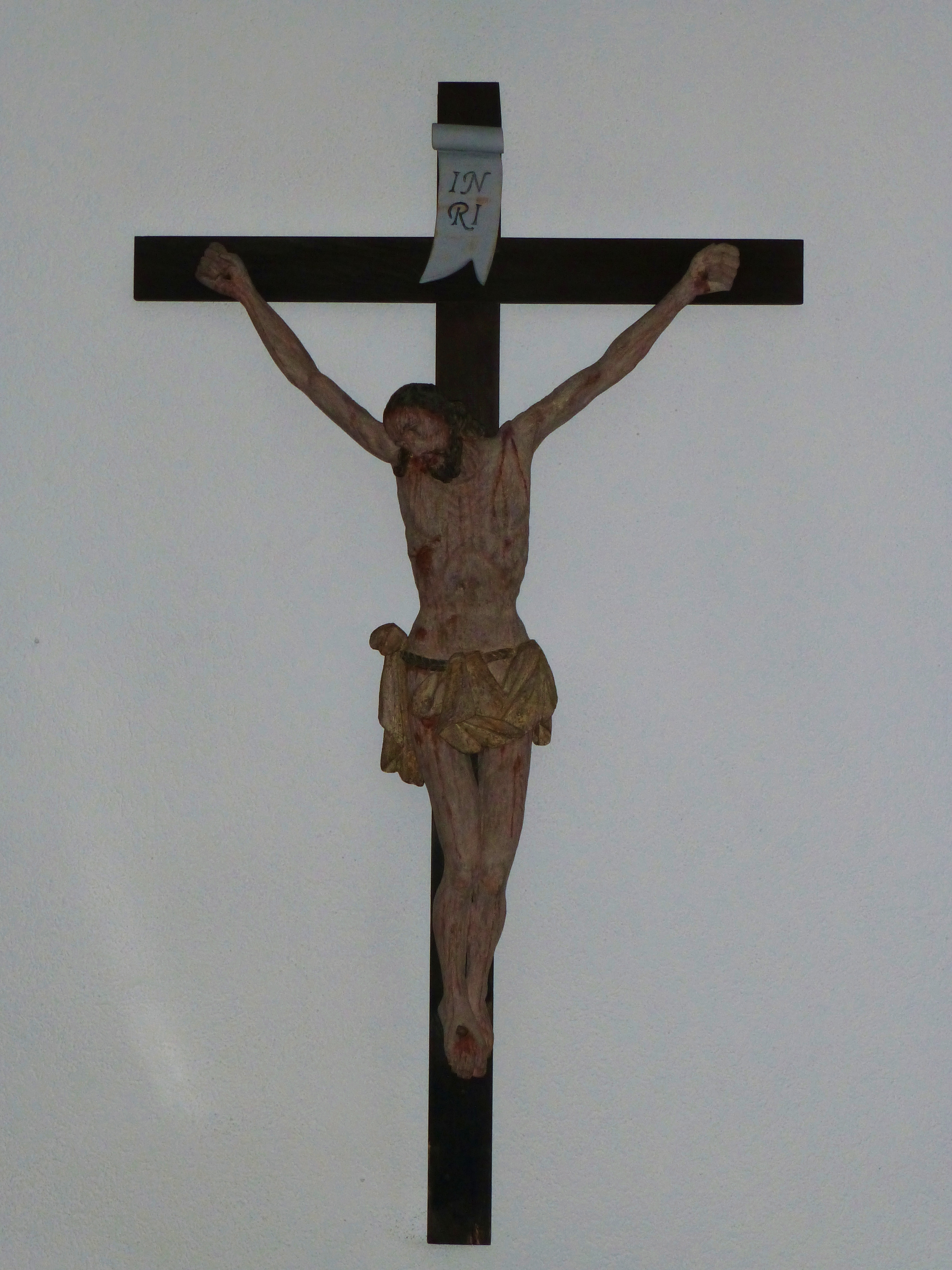 das Kruzifix in der Seitenkapelle der Guthirtenkirche in Lustenau aus der zweiten Hälfte des 18. Jahrhunderts